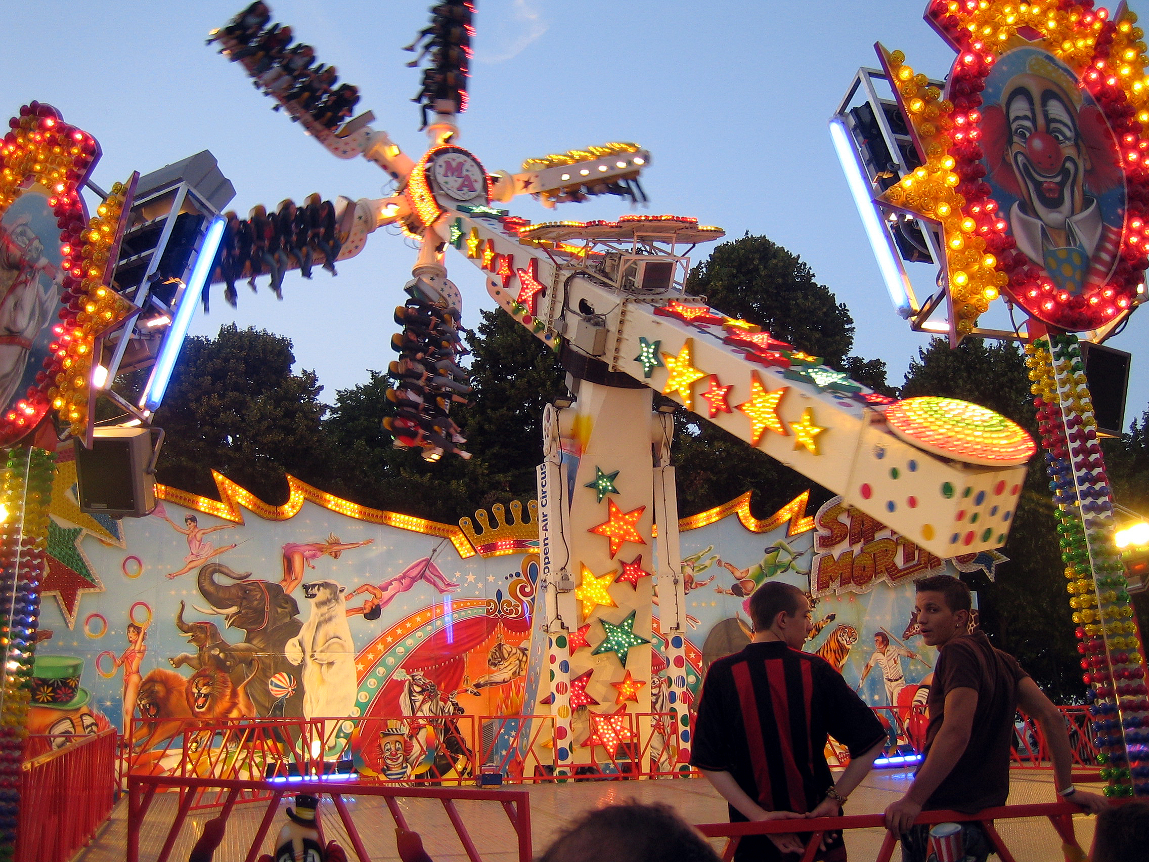 Attraction foraine à Amiens (Somme), lors de la «Foire St-Jean», installée au «Parc de la Hotoie». Photo du 12 juillet 2005.